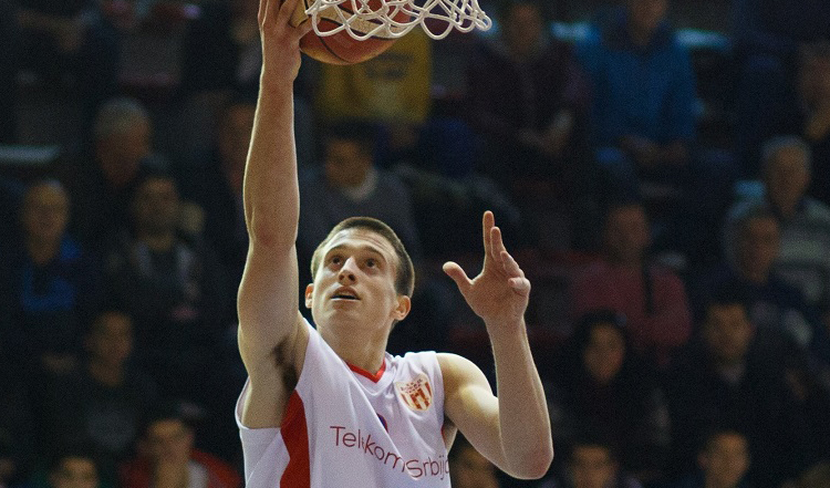 Immagine rilasciata dal proprietario della stessa, pallacanestro Varese